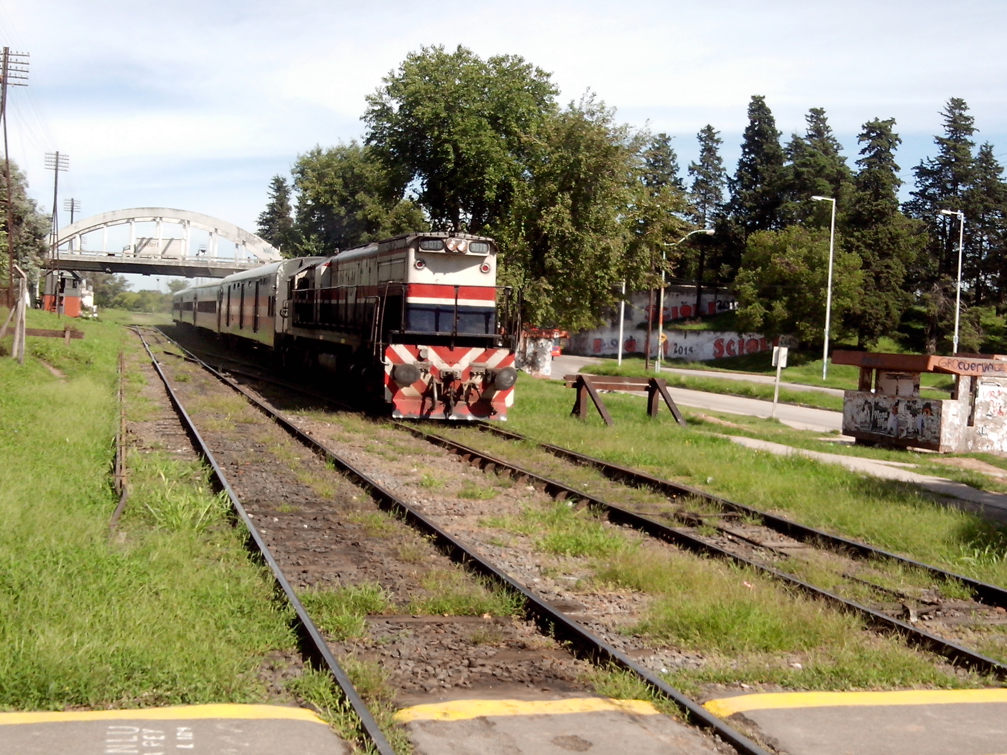 9076 por lujan